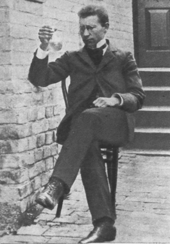 Wojciech Świętosławski, polish biochemist